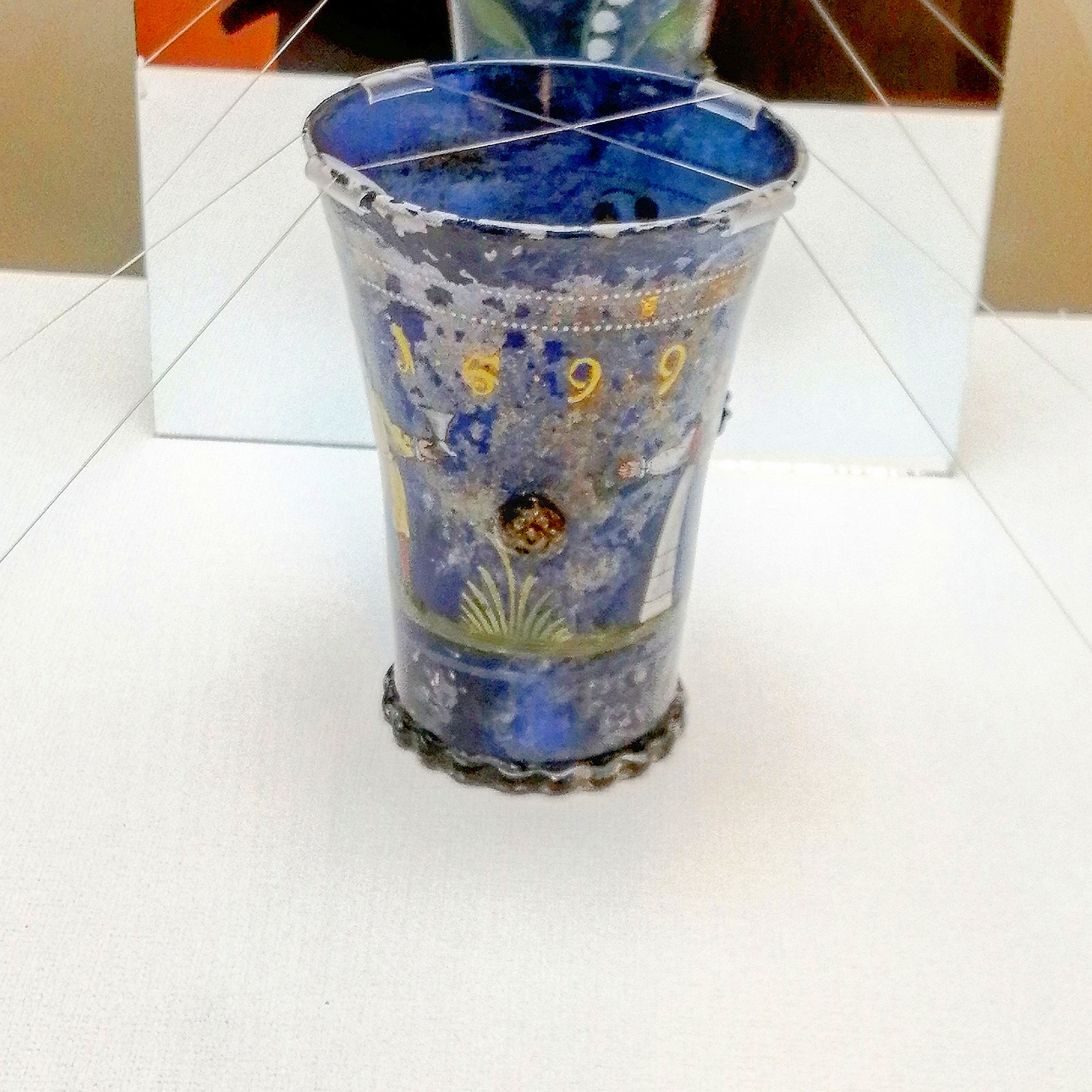 祝婚青色ガラス杯（1599年製） 松平忠雄墓所出土